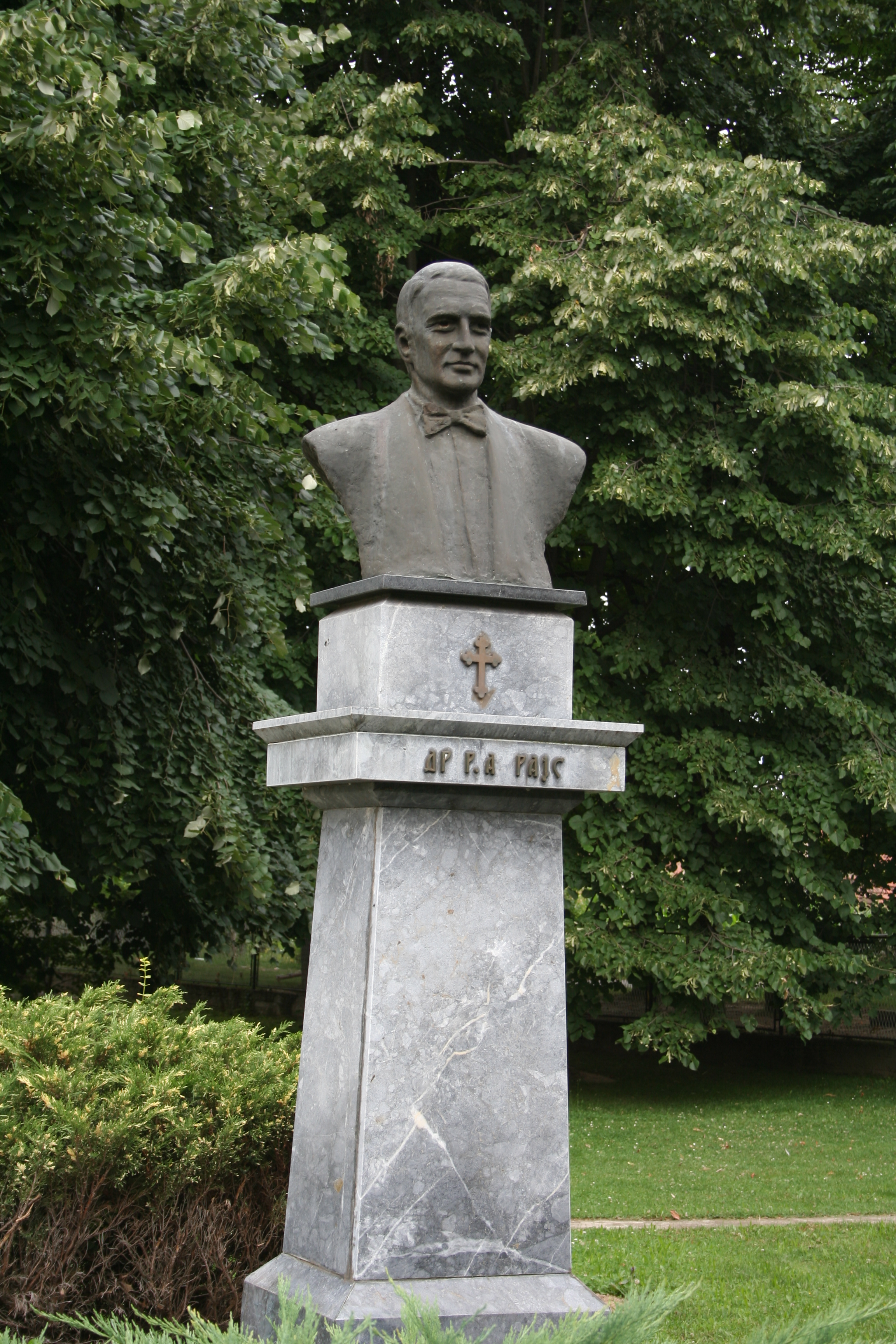 Crkva Sv. Ilije, Prnjavor